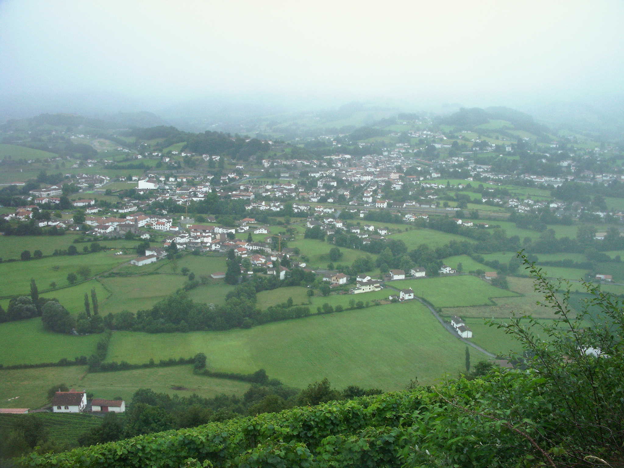 Donibane Garazi lainopean, Izpurako mahastietatik ikusia